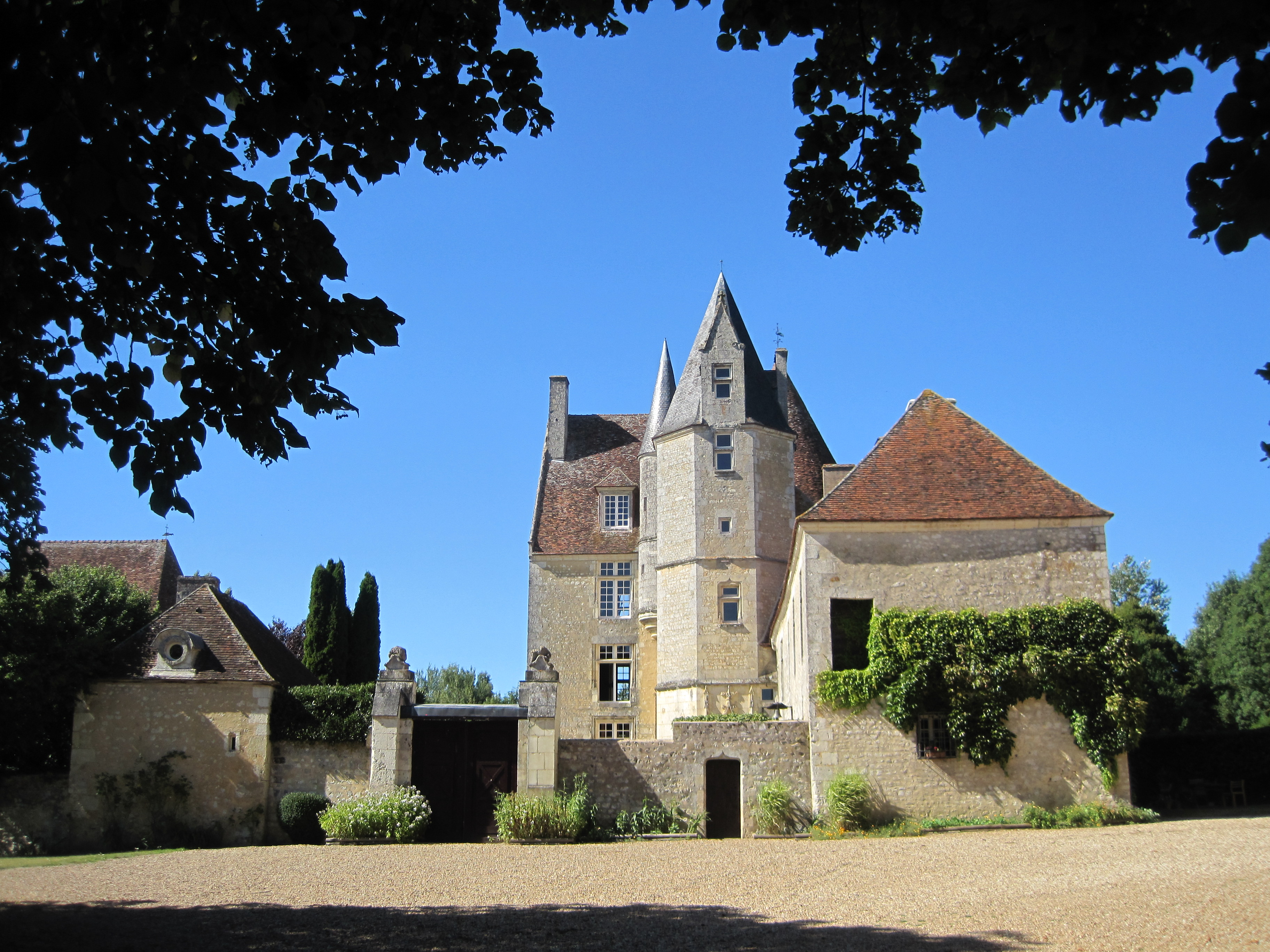 Manoir de la Vove, à Corbon, dans l'Orne, vu depuis l'allée d'entrée.